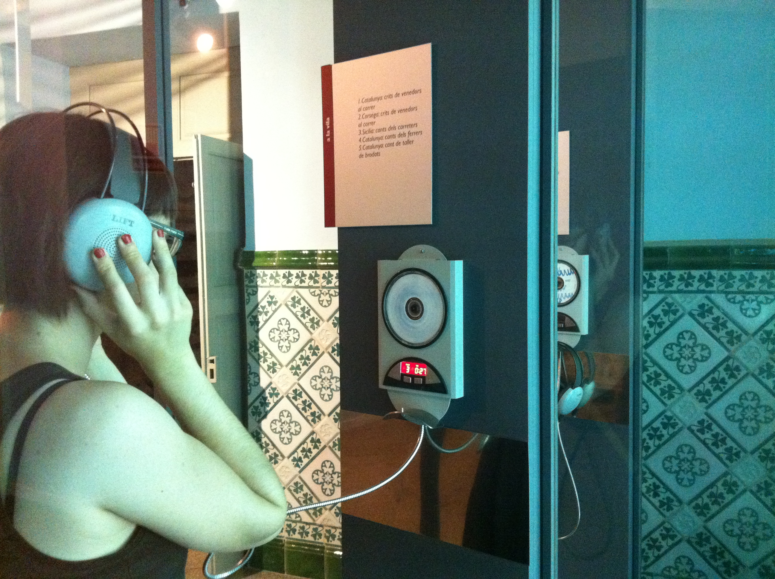 Museu de la Mediterrània de Torroella de Montgrí